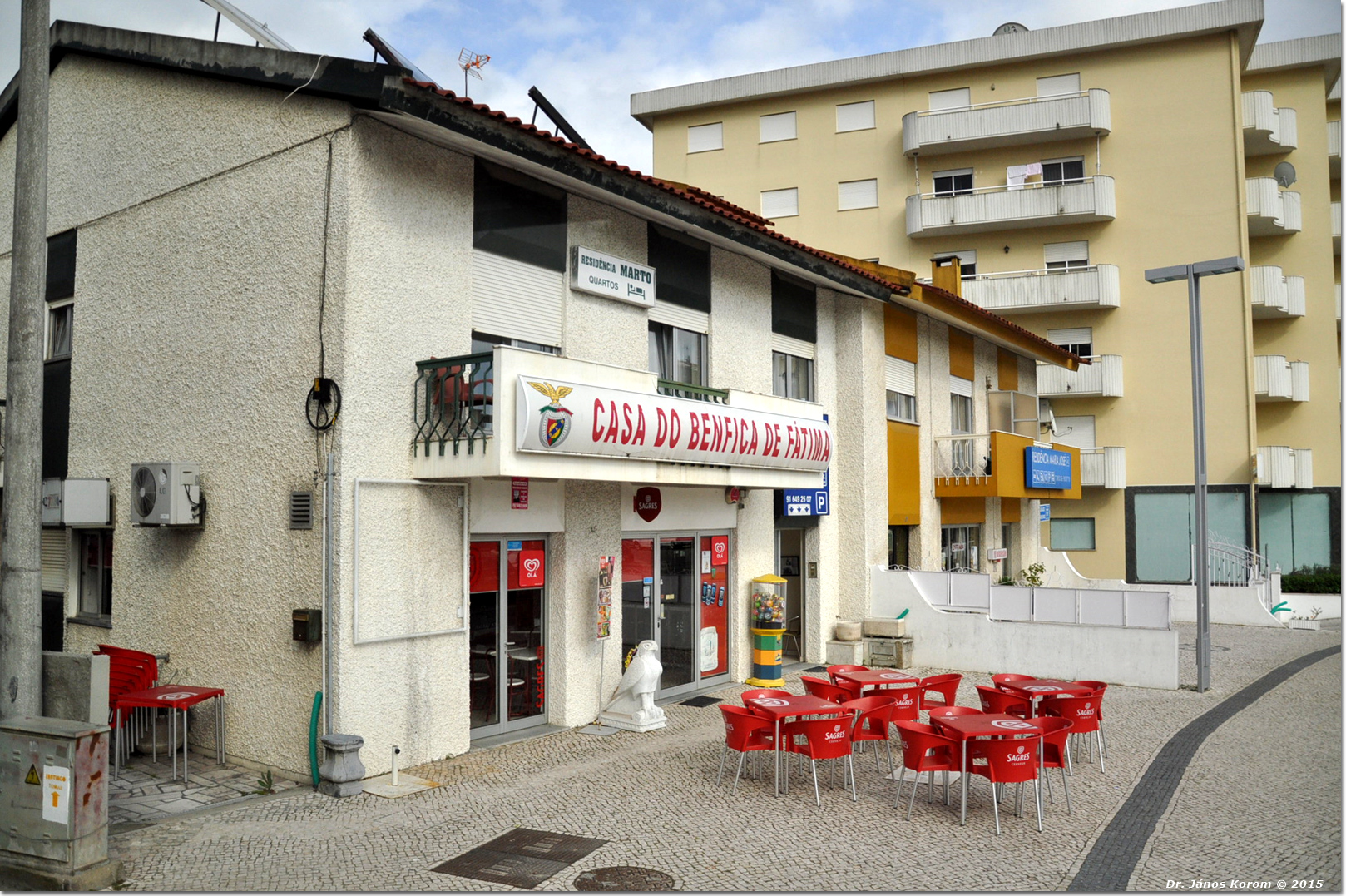 Fatima 0303